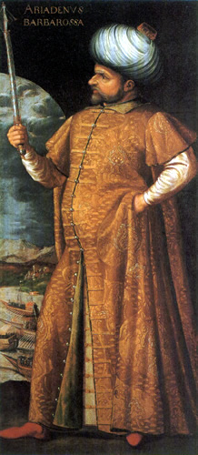 Khair ad-Din Barbarossa, türkischer Seeräuber († 1546), Darstellung des 16. Jh.